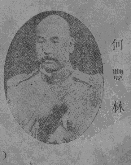 《民國名人圖鑑》肖像